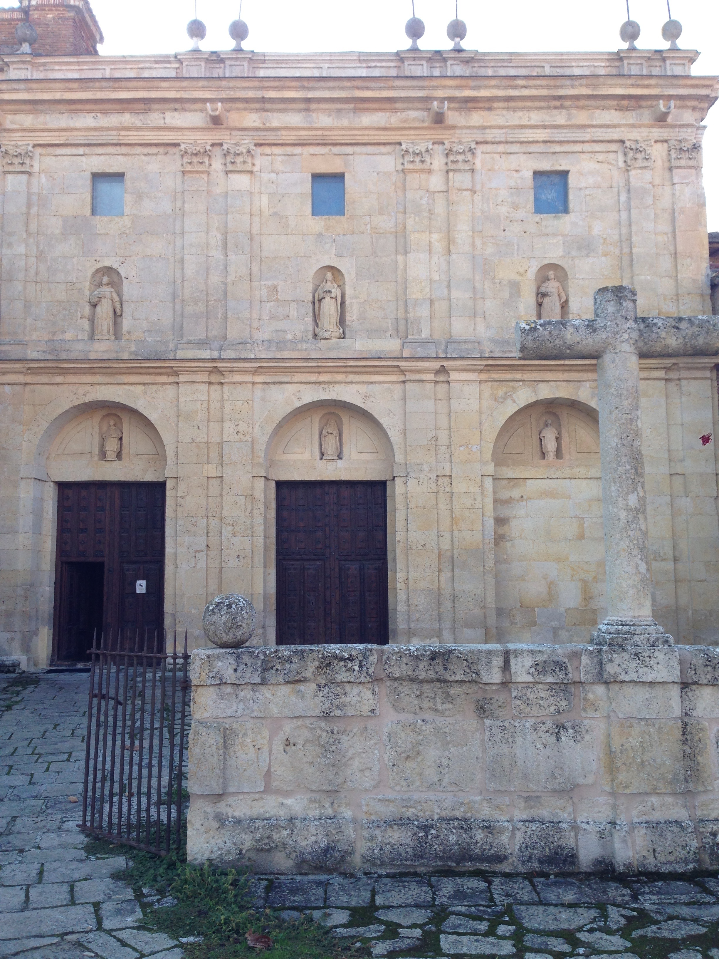 Wejście do kościoła w klasztorze Świętej Klary w Carrion de los Condes, w prowicji Palencia (region Kastylia i Leon) w Hiszpanii.